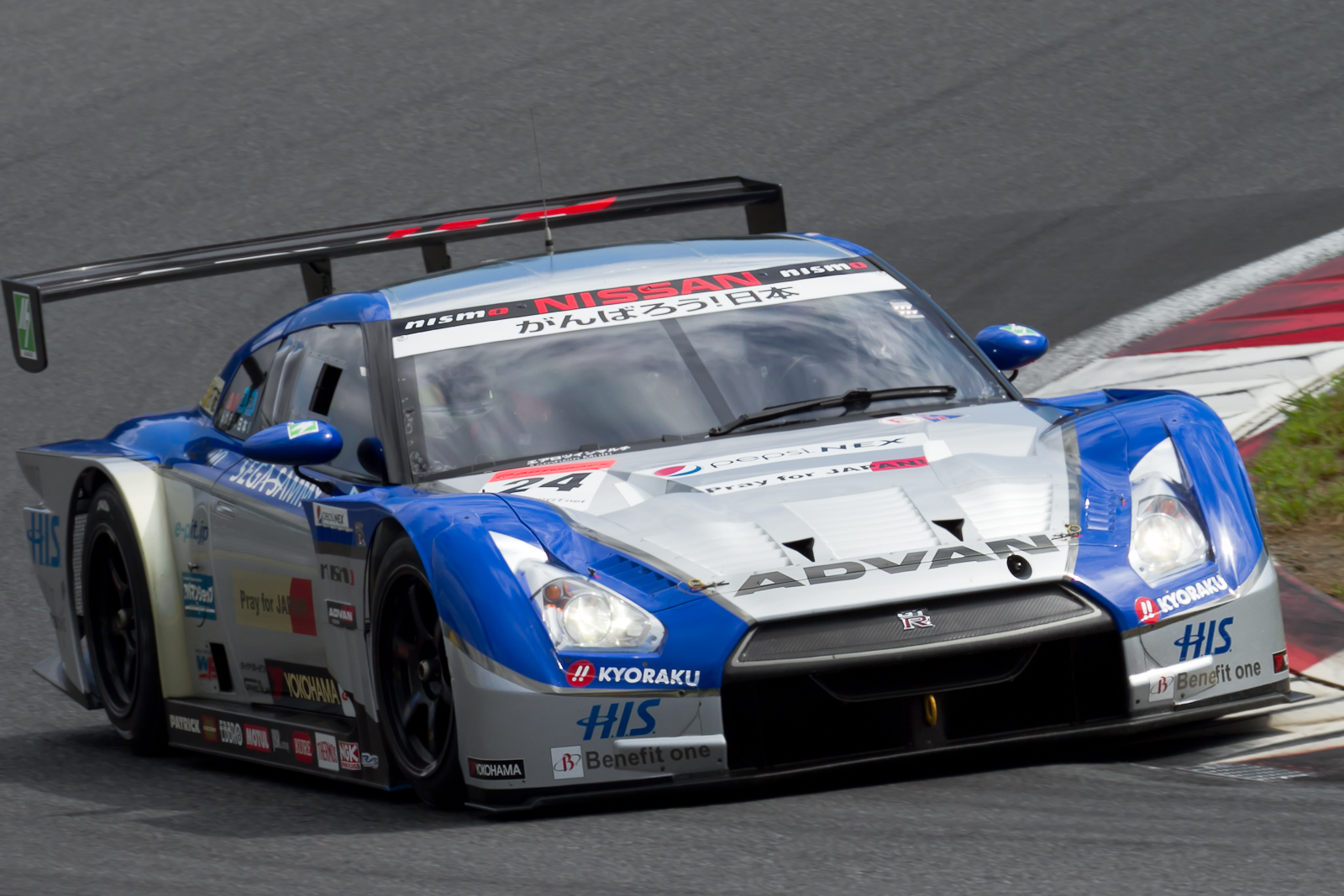 Super GT 2011 Rd.6 Fuji GT 250km: Hironobu Yasuda (Kondo Racing) driving the Nissan GT-R GT500.